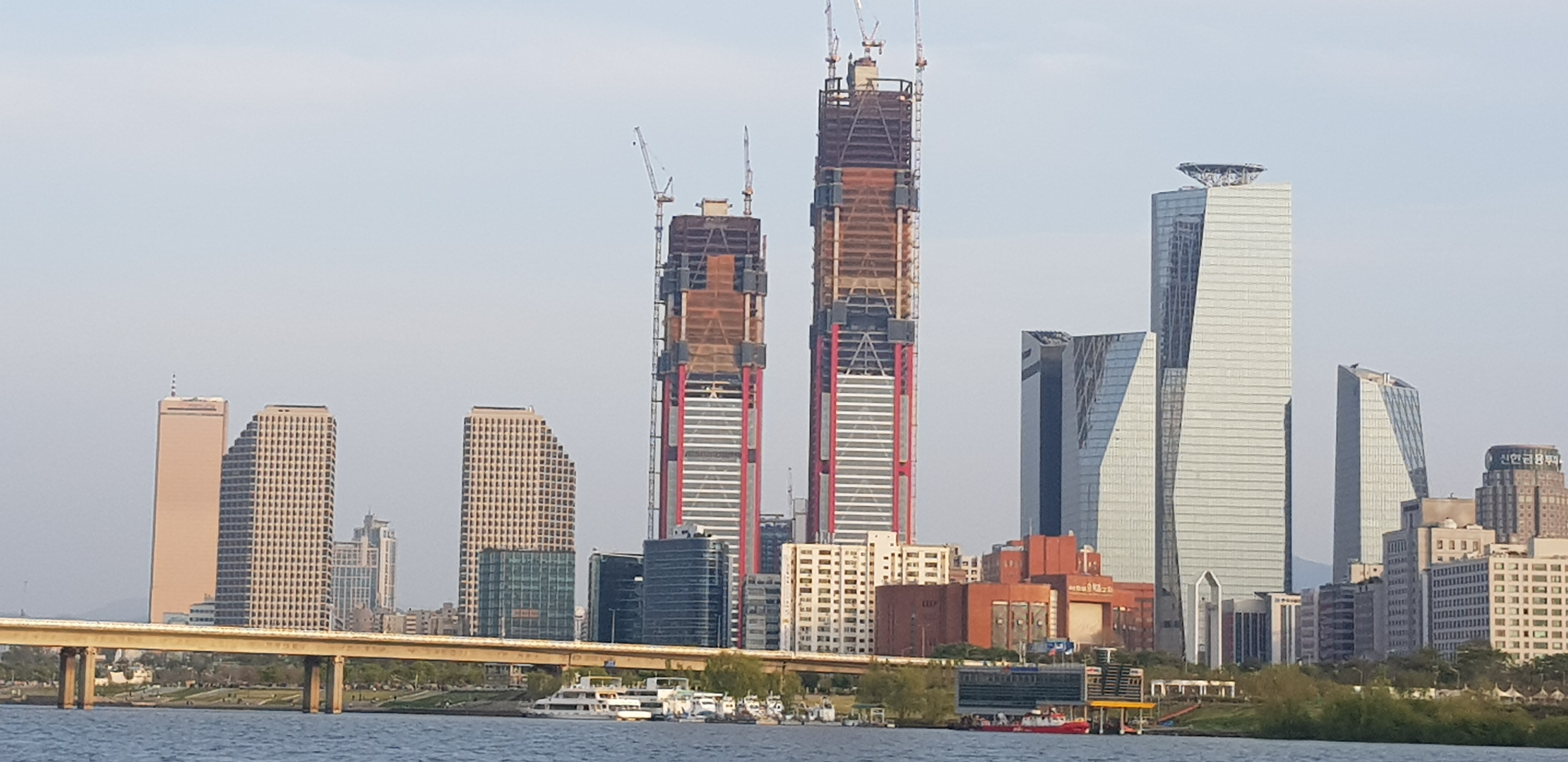 한강 유람선 안에서 촬영한 여의도의 모습입니다. 왼쪽부터 한화 63빌딩, LG 트윈타워, 공사중인 파크원, IFC몰 입니다.